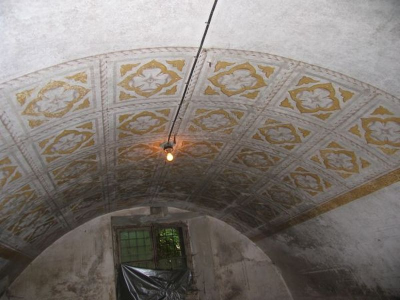 Loftmaleri i officersdafsnit.